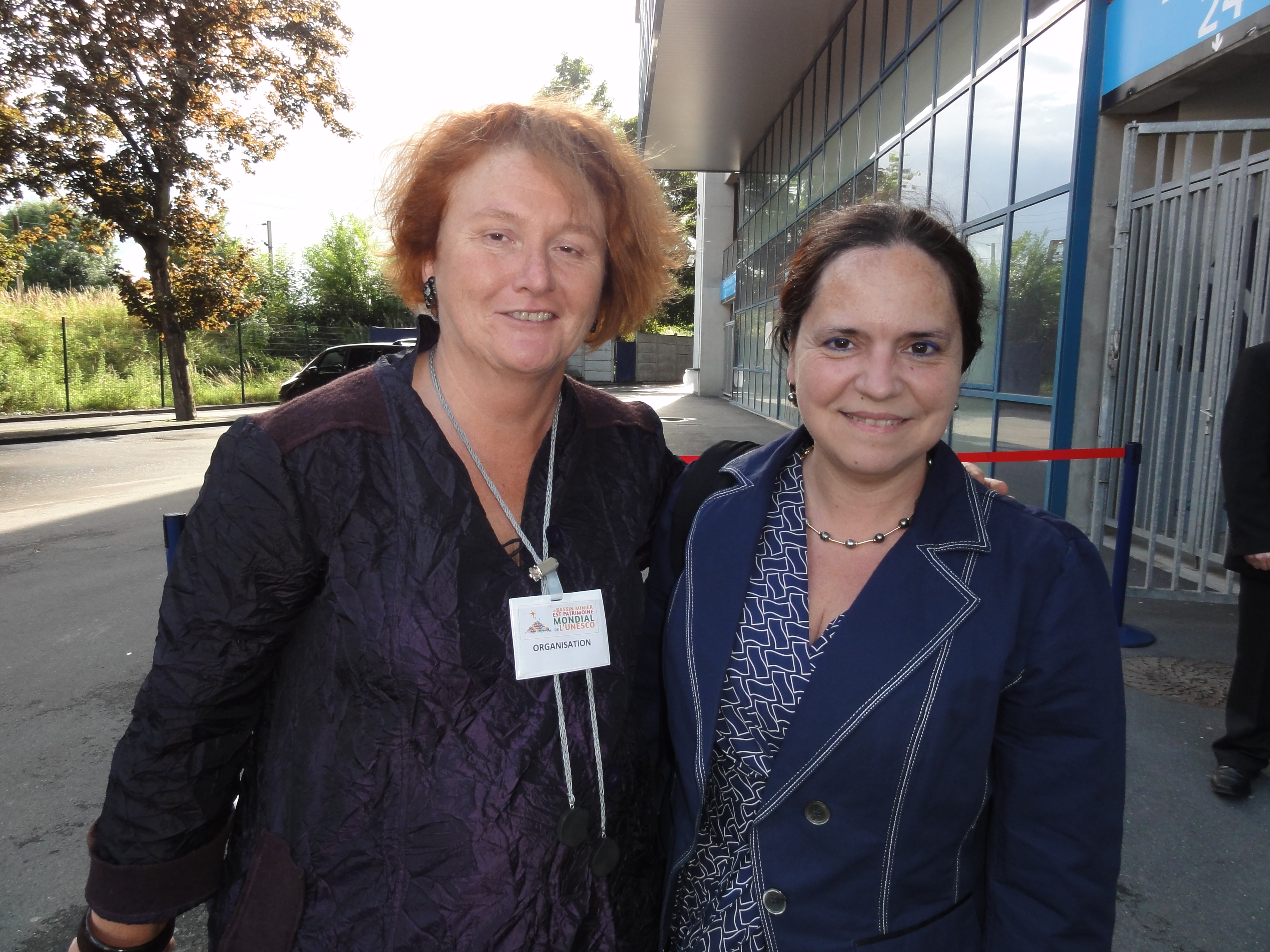 Le Stade Félix-Bollaert à Lens a été utilisé le vendredi 6 juillet 2012 pour fêter de manière officielle le classement de 353 éléments répartis sur 109 sites du bassin minier du Nord-Pas-de-Calais au patrimoine mondial de l'Unesco.